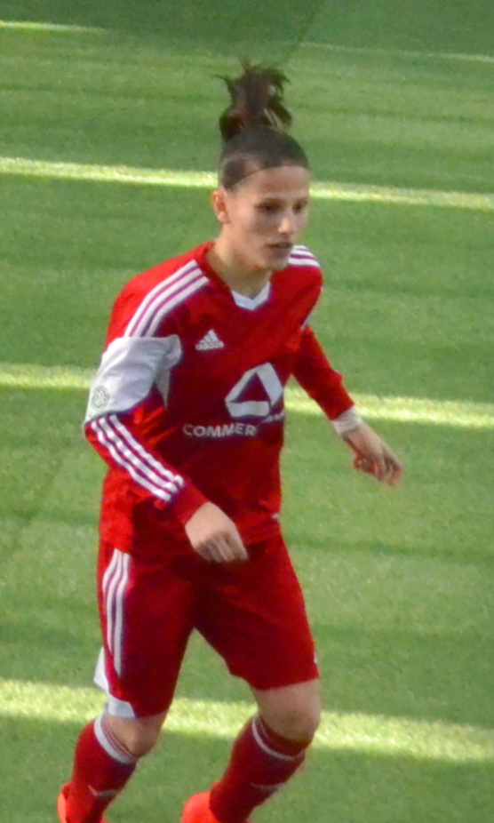 Valentina Limani (1. FFC Frankfurt II) beim SAP Frauen-FußballCup 2017